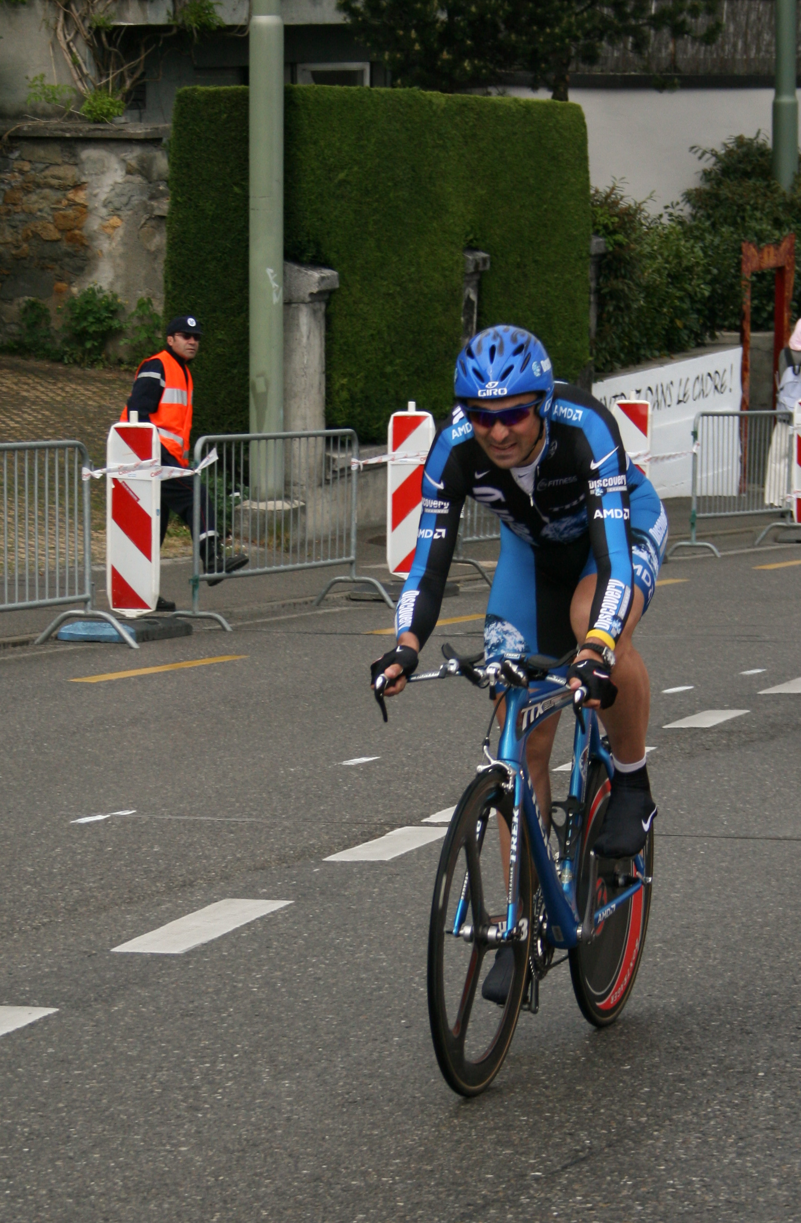 Benjamin Noval Gonzales prologue du Tour de Romandie 2007